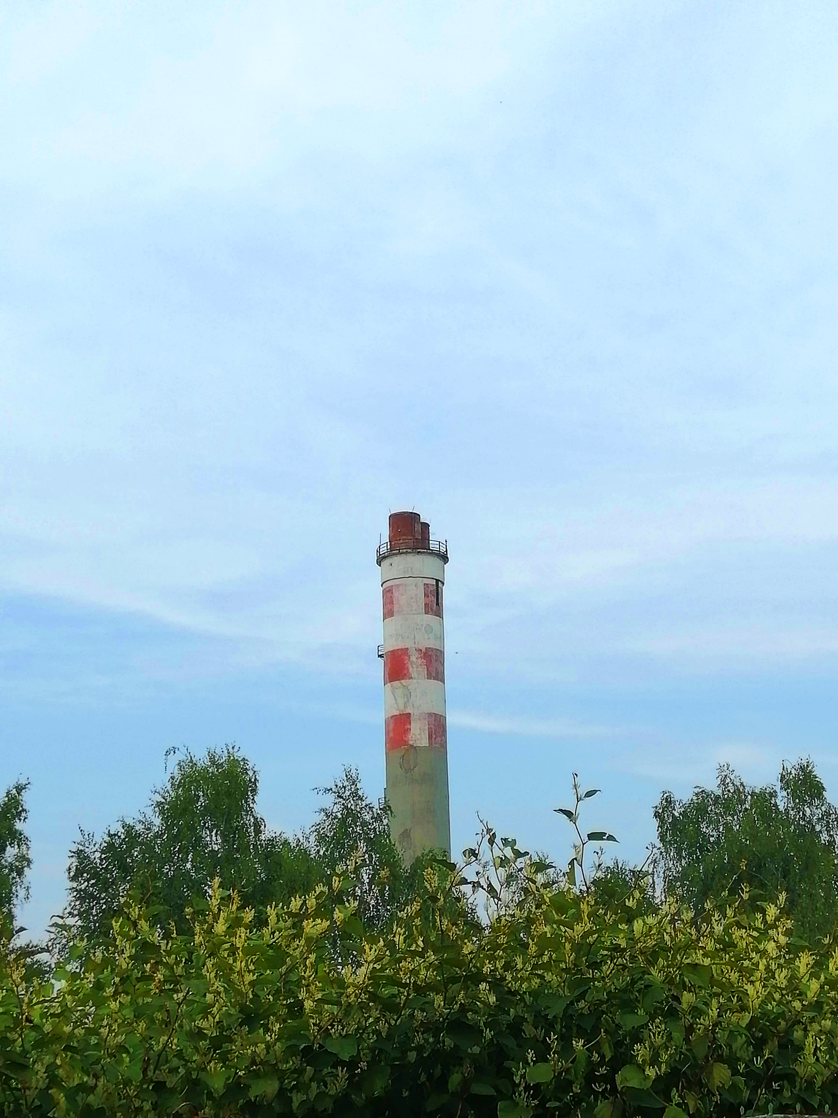 Dimnjak nekadasnje toplane u Derventi